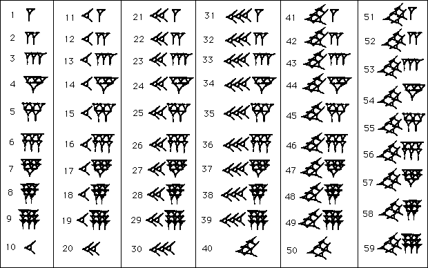 Вавилонски клинасти бројеви